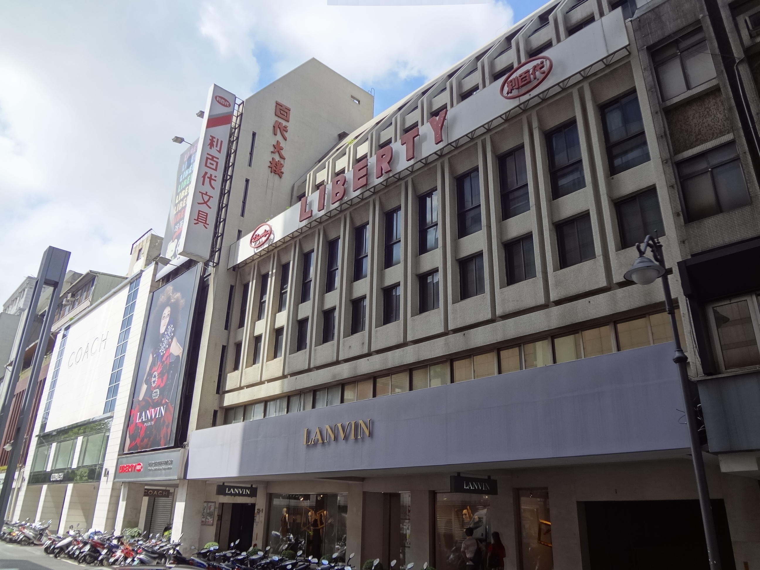 百代大樓，是利百代國際實業總部，位於臺北市中山區中山北路二段45巷21之1號。